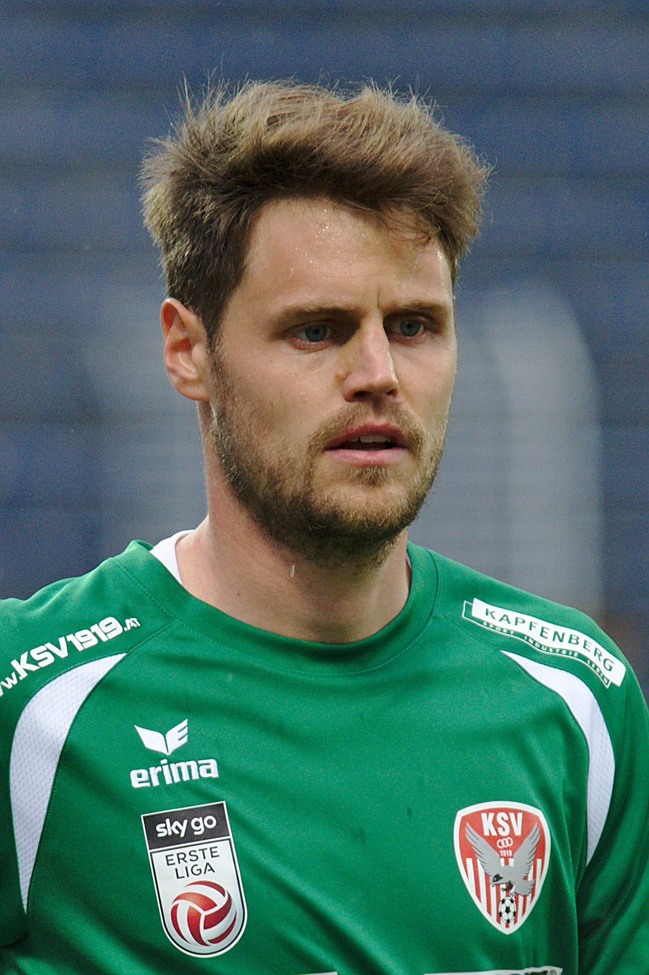 Saisonvorbereitungsspiel Admira Wacker Mödling gegen Kapfenberger SV am 17.6.2017, Bild zeigt: Christian Petrovcic